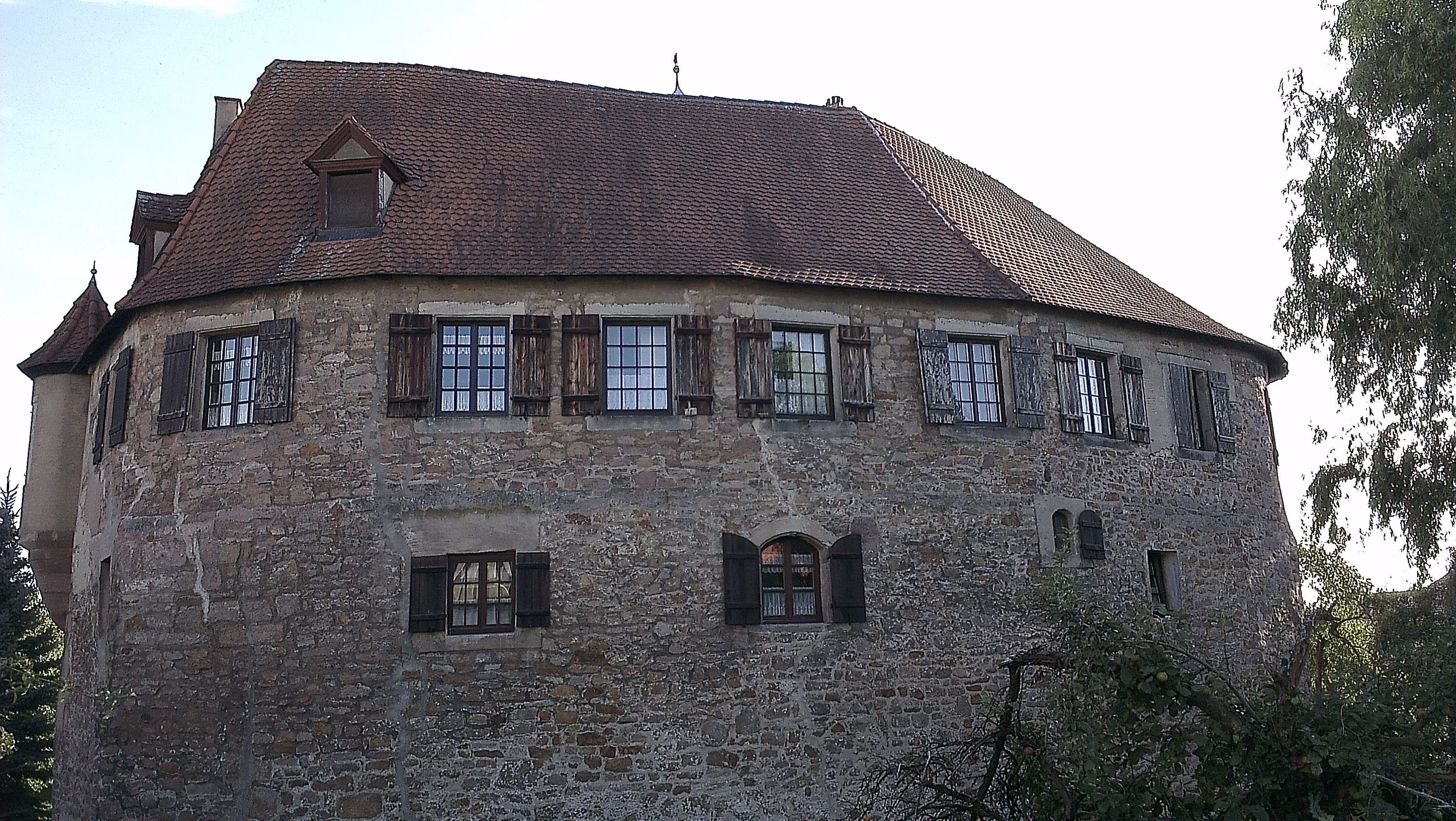 Rieterschloss in Nürnberg Kornburg – Ansicht von Nord